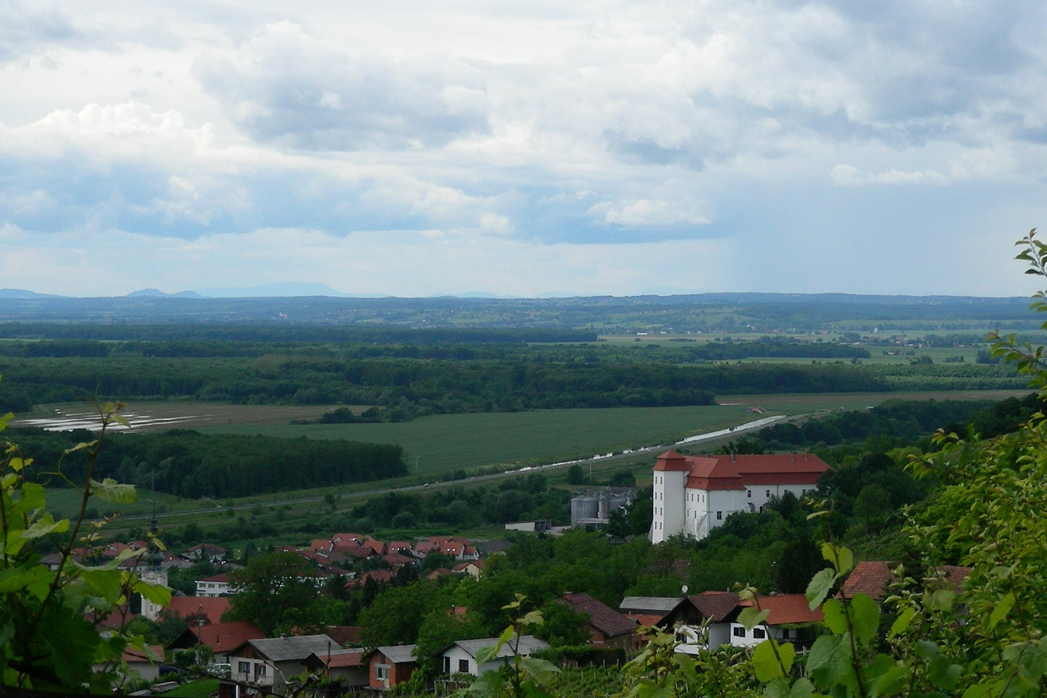 Blick über Lendava in die Mur-Ebene